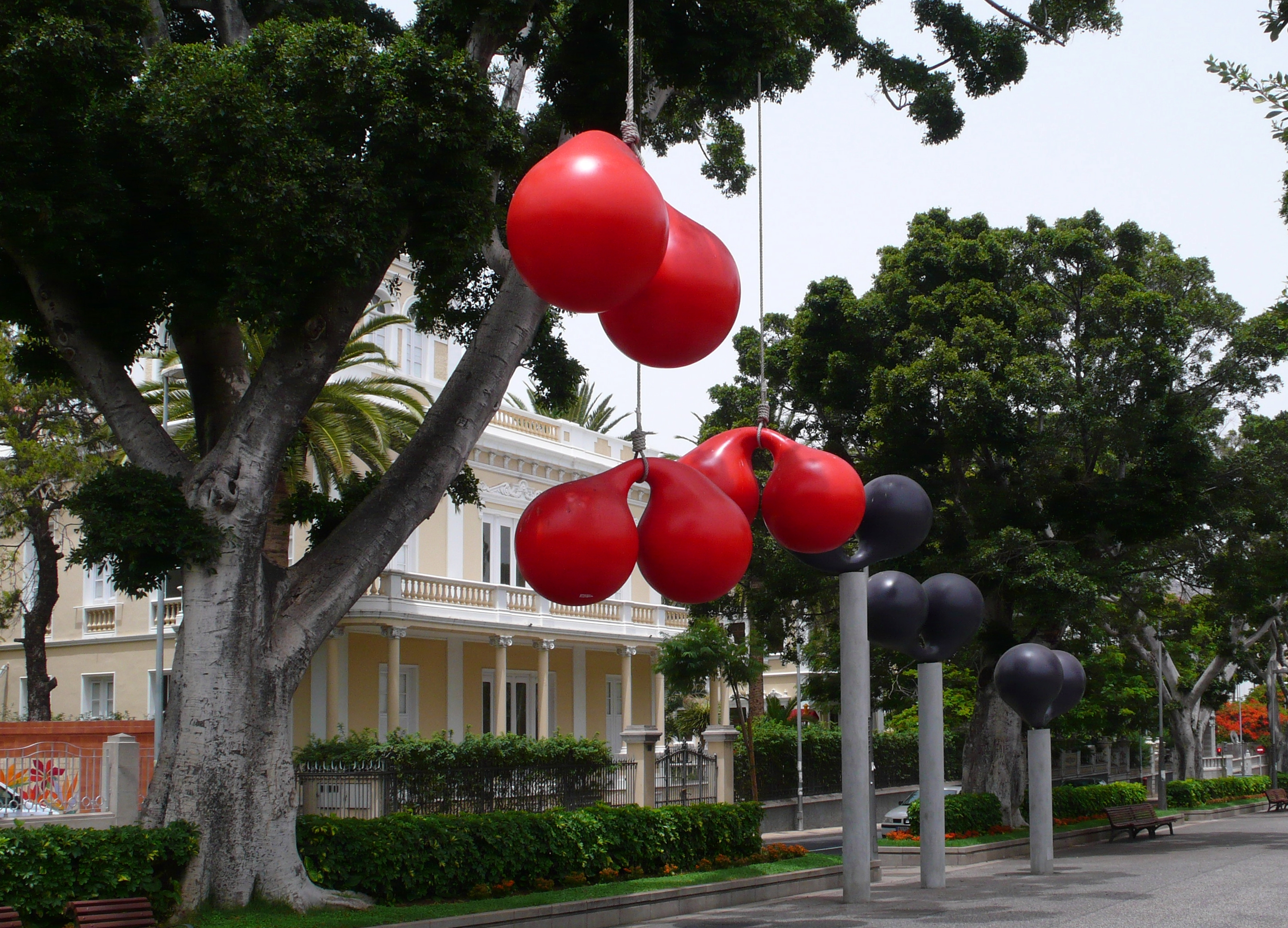 Escultura "Ejecutores y ejecutados" de Xavier Corberó, 1973. Rambla de Santa Cruz de Tenerife, Islas Canarias.